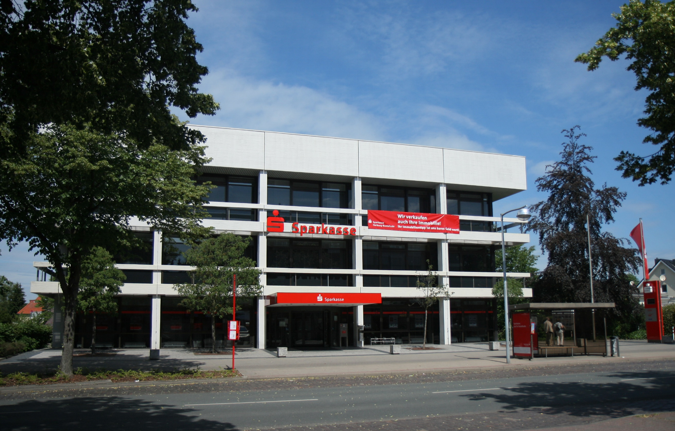 Sparkasse Harburg-Buxtehude in Buxtehude.